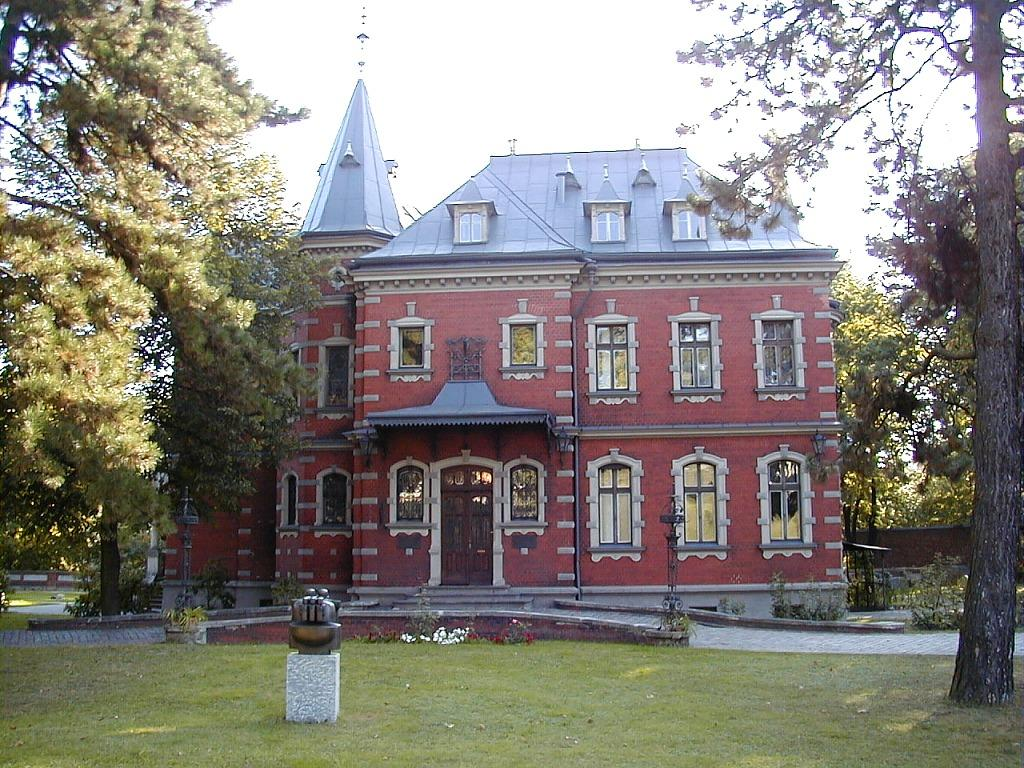 Rīga, Latvijas kultūras muzejs Dauderi 1999-09-19